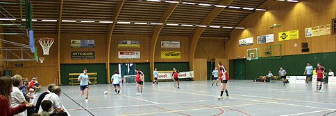 Foto van minivoetbalwedstrijd, eigen foto